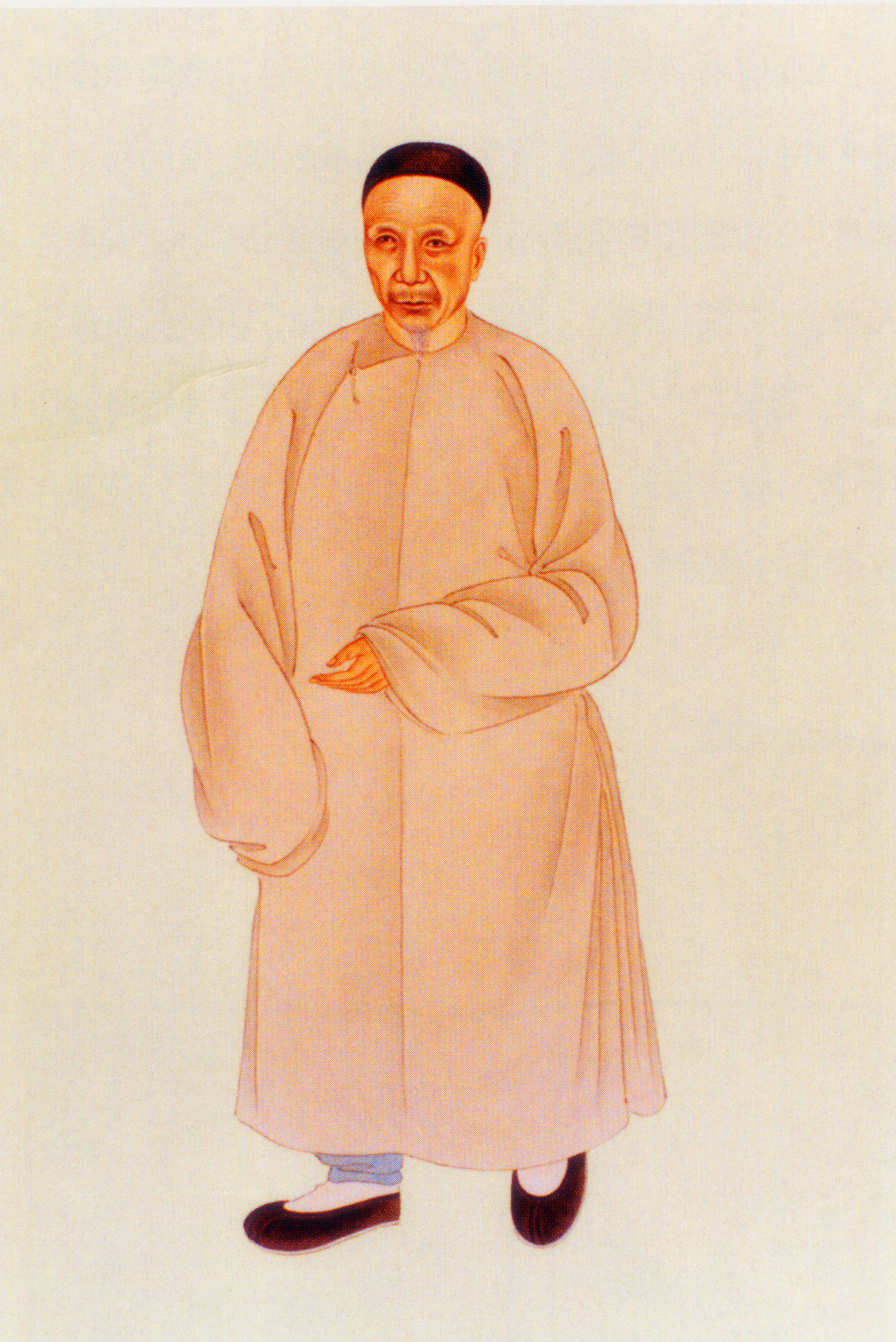 清代学者。